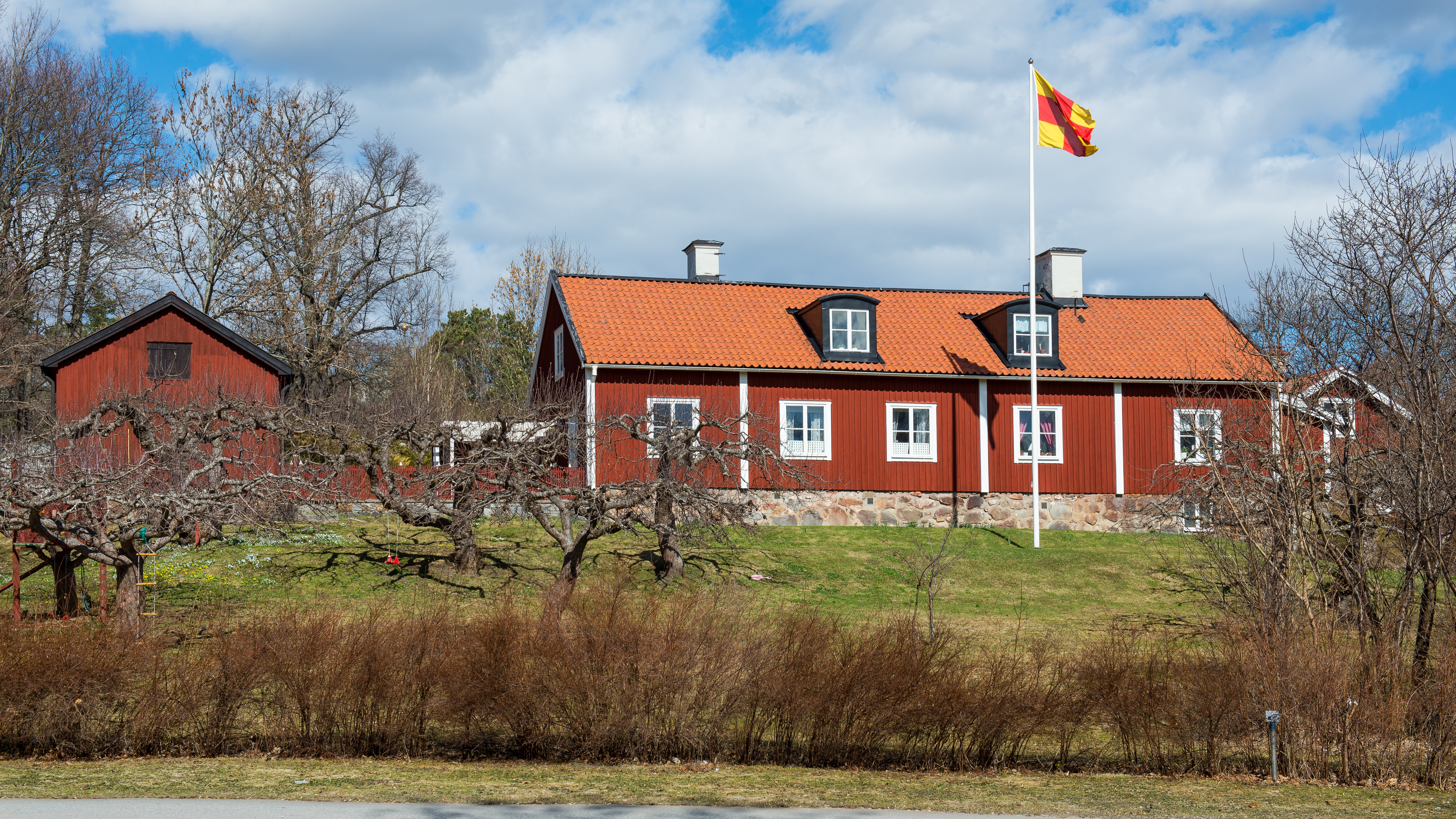 Bromma prästgård (Bromma rectory). Till vänster om prästgården ligger tiondeladan och till höger ligger sockenstugan.